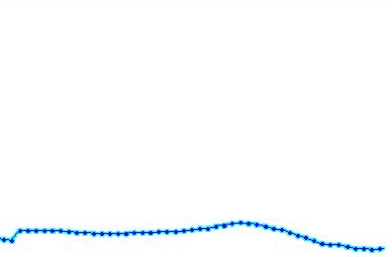 Sleeptoon in het Roermonds (F0-waarde). Schermafbeelding van eigen meting